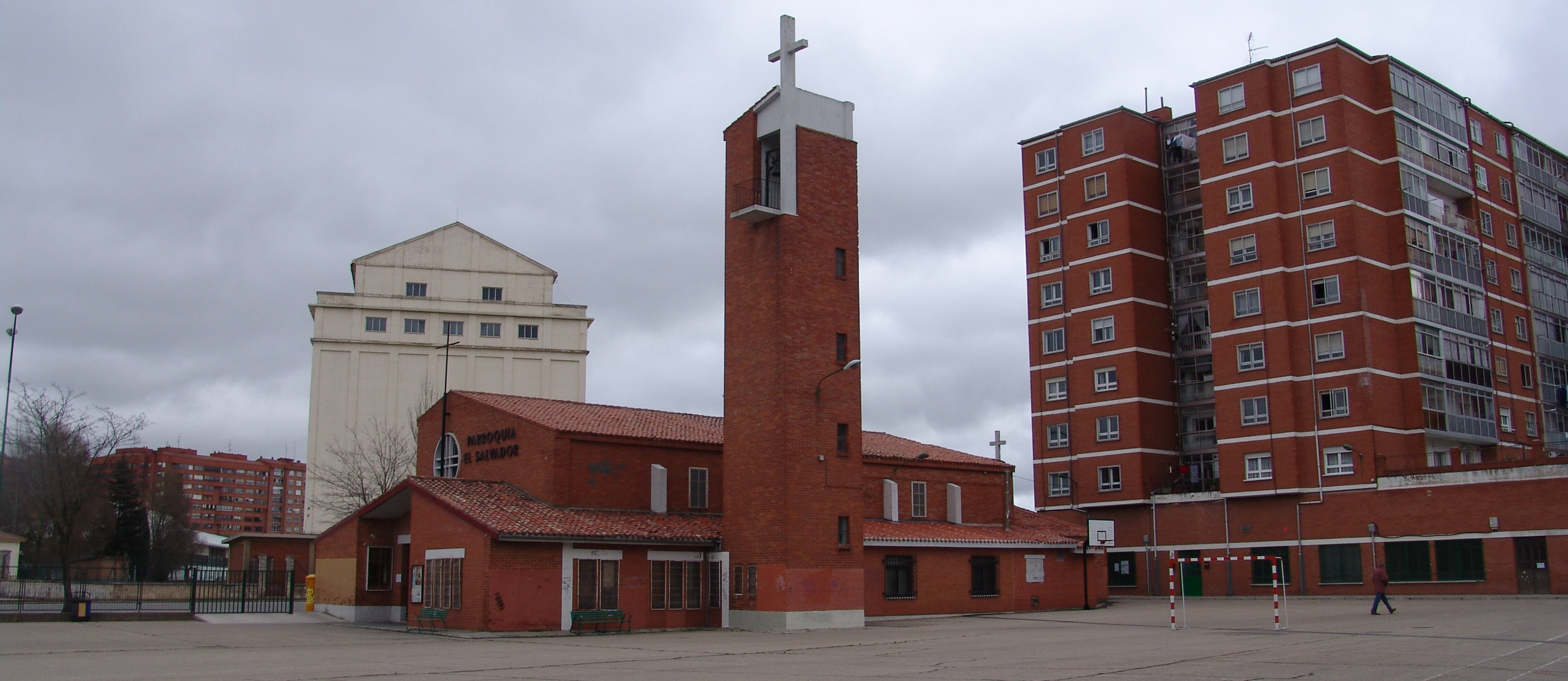 Camino de Santiago, Iglesia de El Salvador, Capiscol, Burgos (España)..